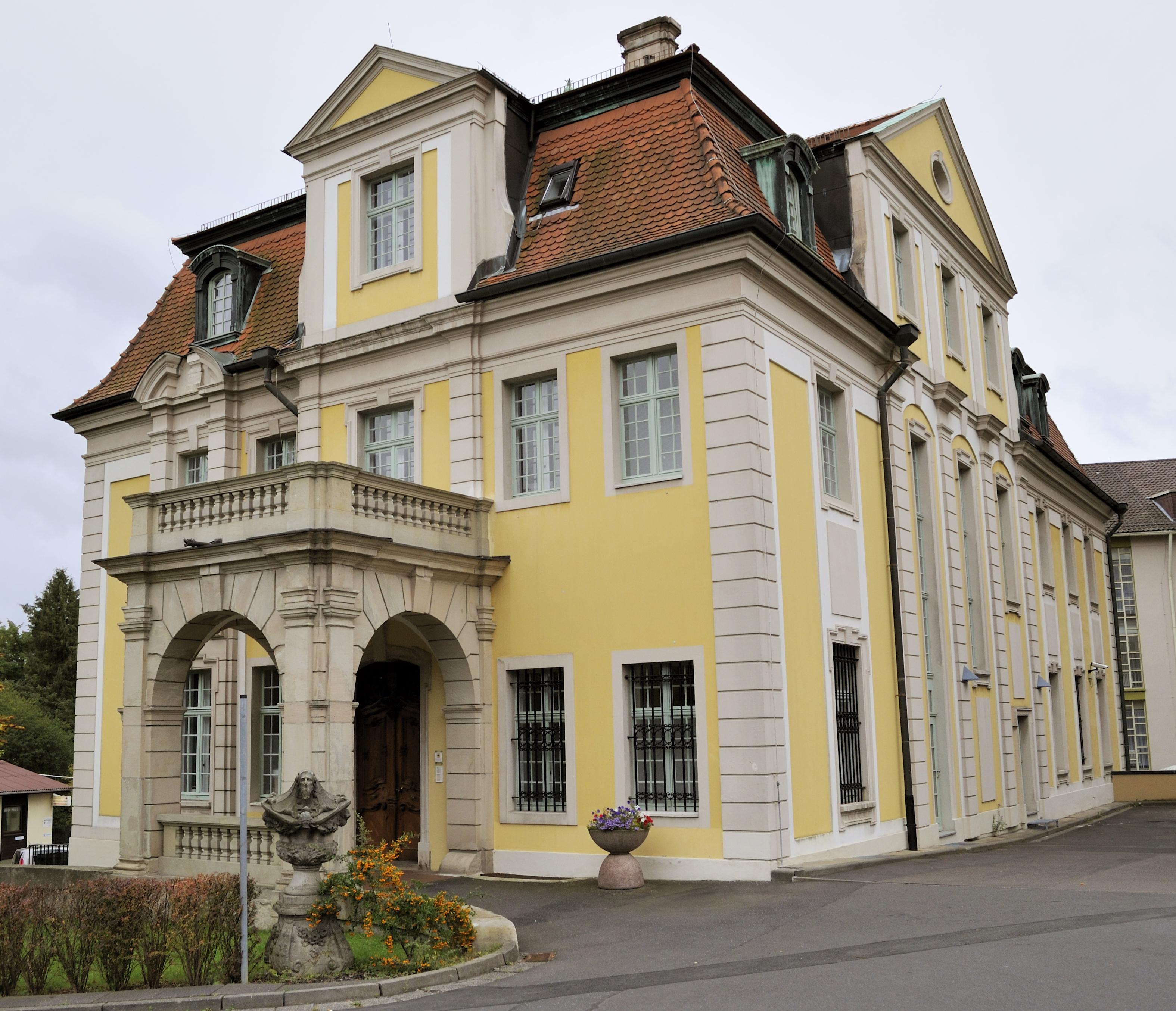 Dieses Foto entstand im Rahmen des Projekts Wiki Loves Monuments Mittelhessen, das aus dem Community-Projektbudget von Wikimedia Deutschland e. V. gefördert wurde.